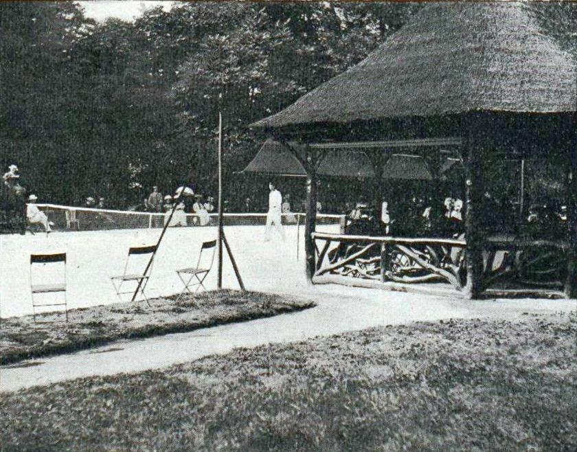 Le cours de l'île de Puteaux, lors des finales du tennis aux Jeux Olympiques de 1900.